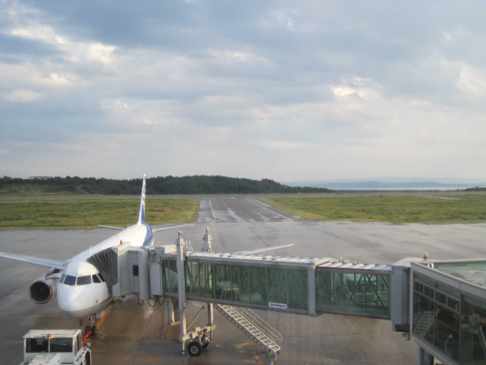 能登空港に駐機している全日空機